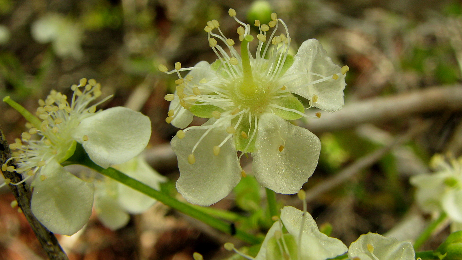 Campomanesia aromatica (Aubl.) Griseb.